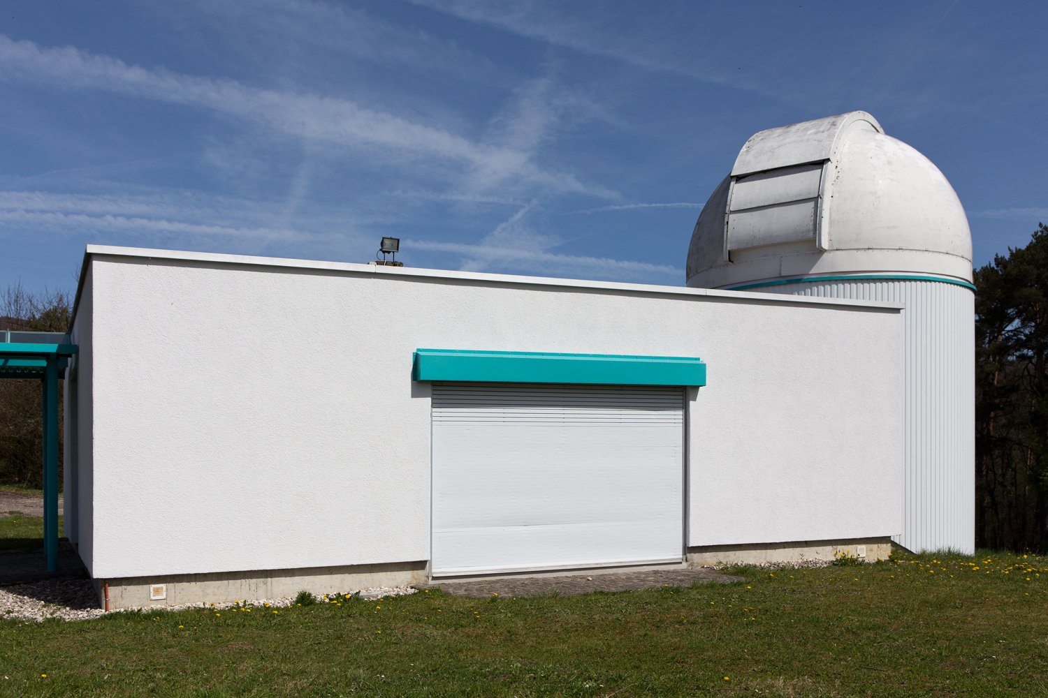 Observatorium in Vicques (Val Terbi) (JU)